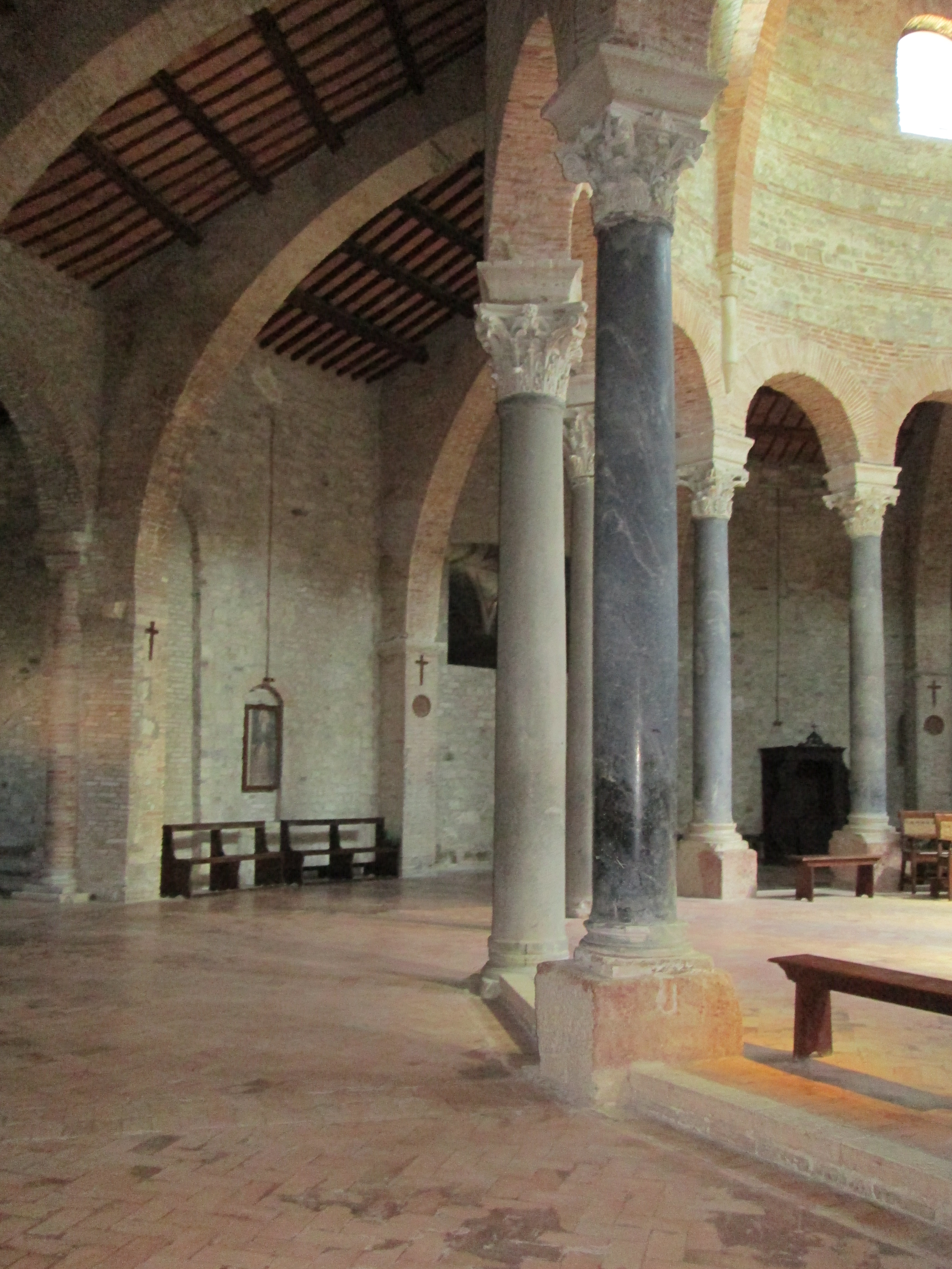 Cassero di Porta Sant'Angelo This is a photo of a monument which is part of cultural heritage of Italy.